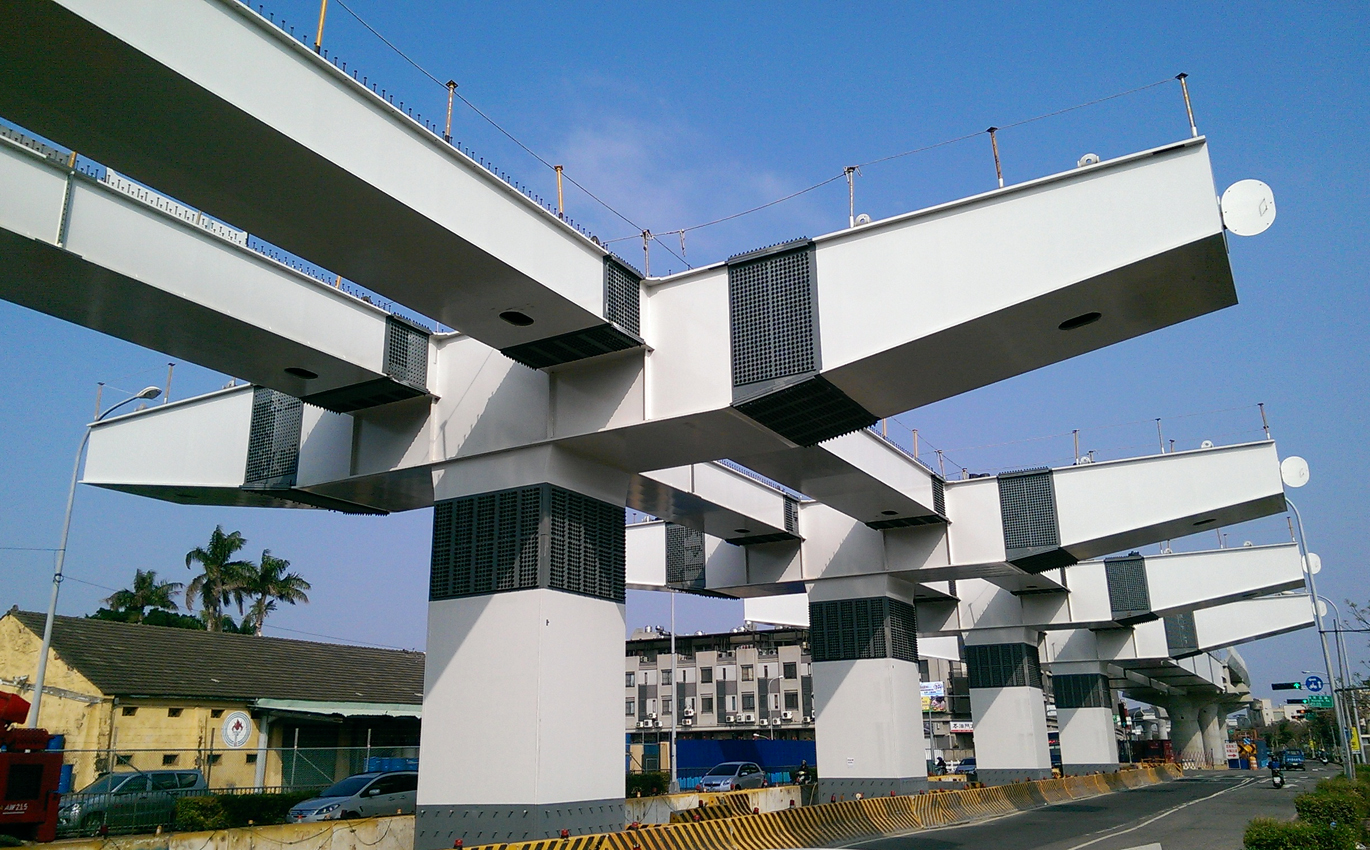 臺中捷運烏日站2015年2月工程